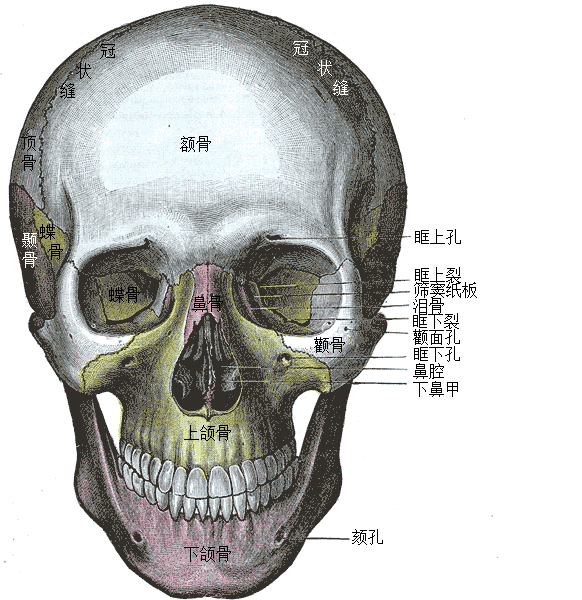 头骨前视图